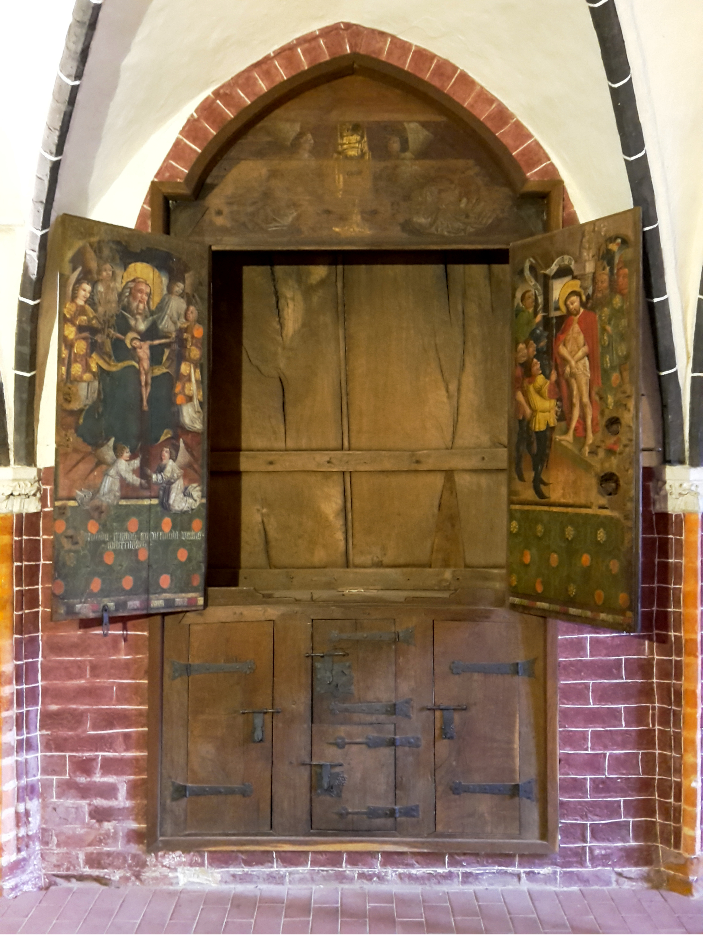 Im geöffneten Zustand.